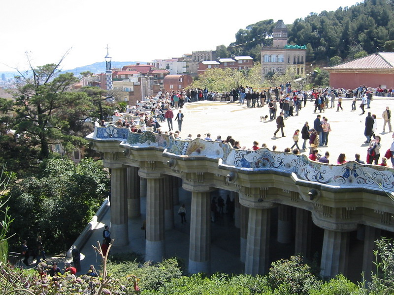 Banco del mirador del Parc Güell